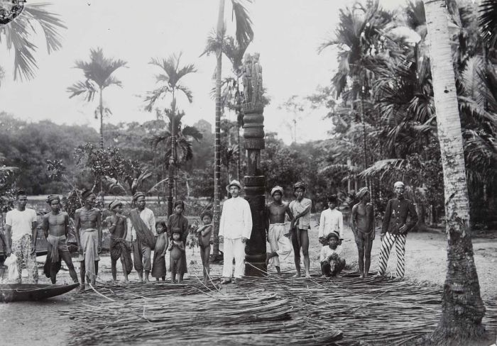 foto. Groepsportret bij een houten Dajak beeld in Moearatewe